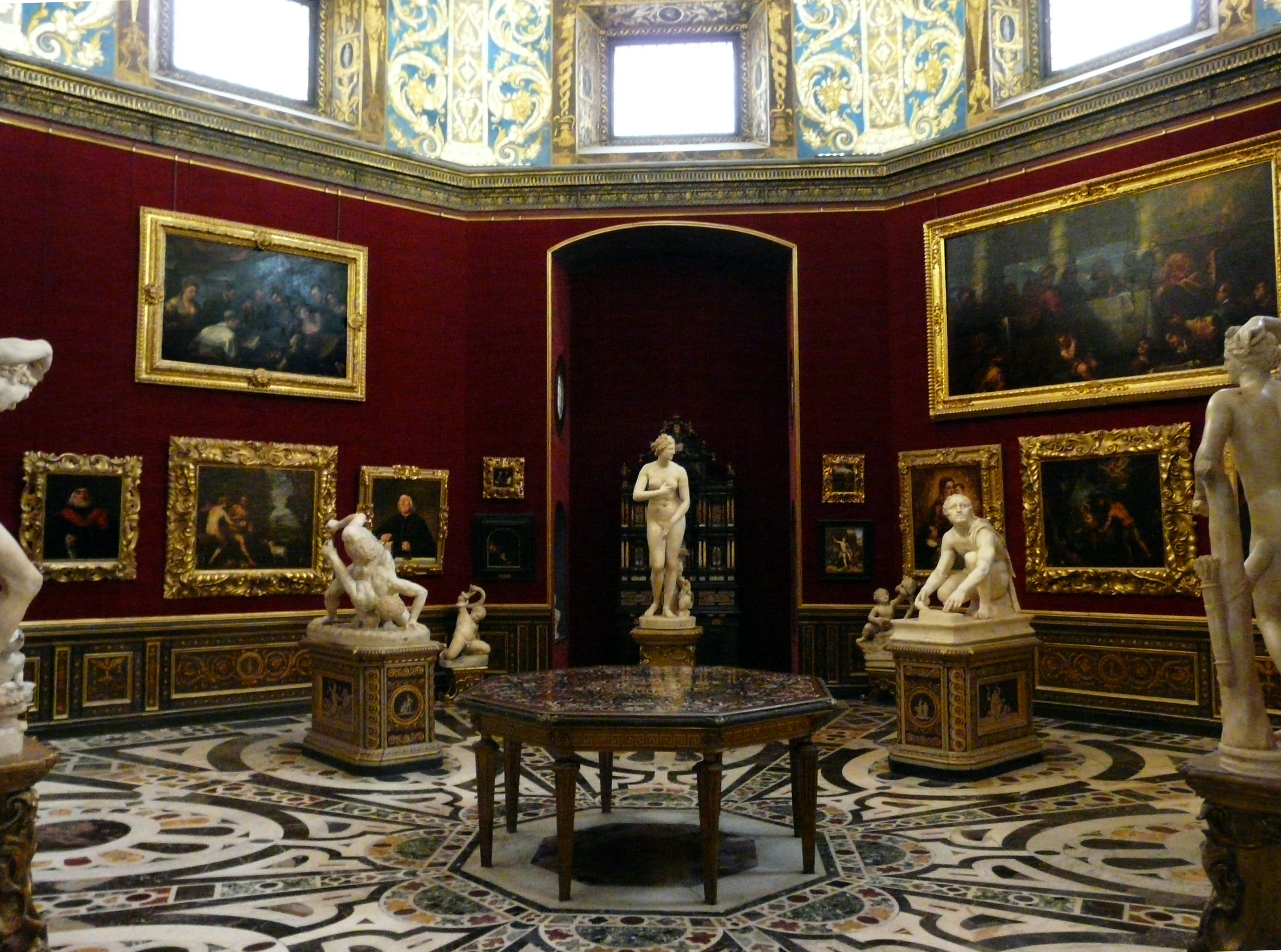 Трибуна